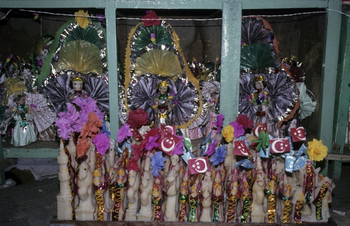 Dia uit een serie foto's die is gemaakt bij de aankoop van een aantal suikerwerkfiguren en mallen om suikerwerkfiguren in te vervaardigen (4635-18*/63). Suikerwerkfiguren worden aan kinderen kado gegeven bij de viering van mawlid an-nabi. Op deze dag wordt de verjaardag van de profeet Mohammed gevierd. Mawlid an-nabi wordt in Cairo gevierd met een kermis, optochten en soefi-ceremonies. De viering komt overeen met de mawlids van islamitische en Koptische heiligen in Egypte. De suikerwerkfiguren zijn het hele jaar door verkrijgbaar, maar worden vooral voor mawlid an-nabi verkocht. Ouders geven de suikerwerkfiguren kado aan hun kinderen. De traditionele verdeling was dat de jongens een boot kregen en de meisjes een pop. Andere figuren waren zowel voor jongens als meisjes bedoeld. Tegenwoordig is deze traditionele verdeling enigszins losgelaten.